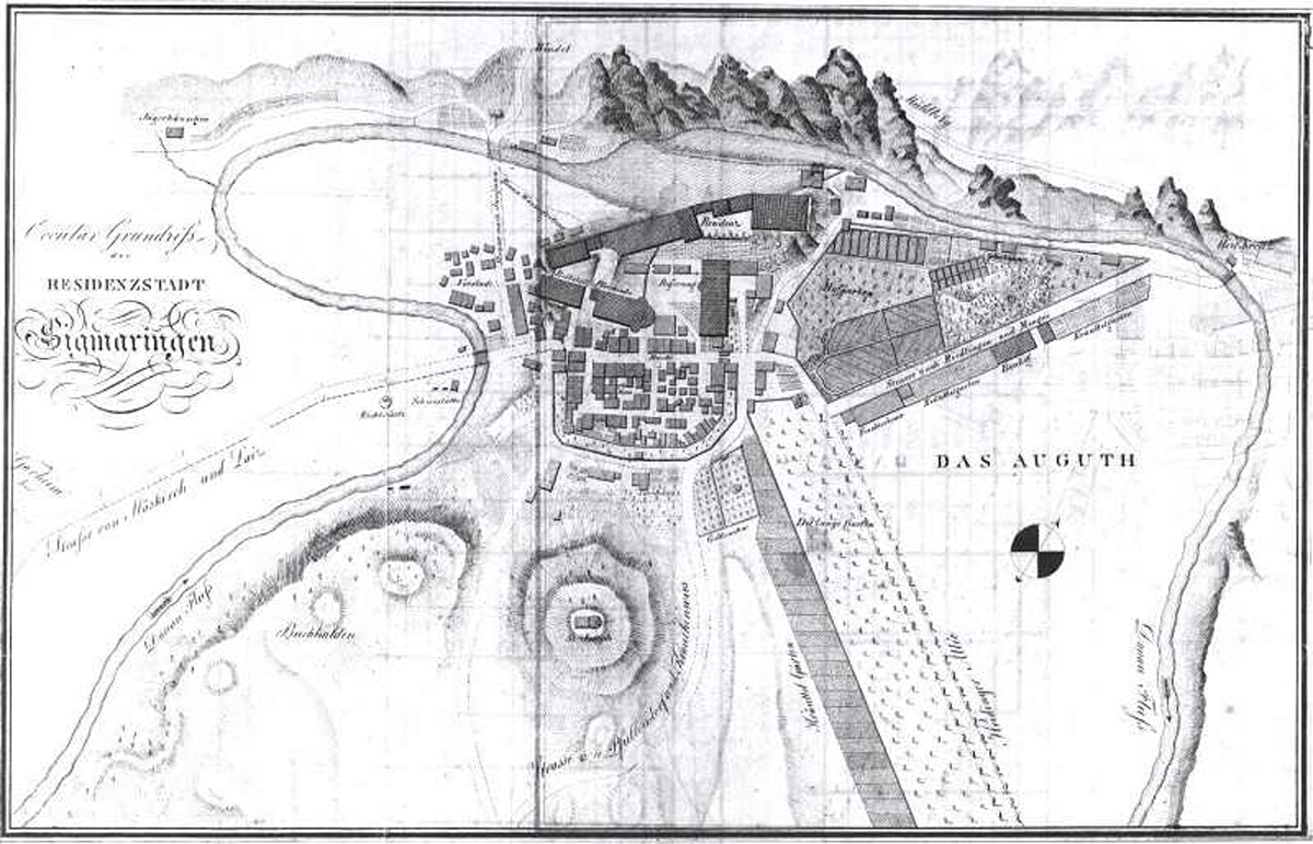 Karte von Sigmaringen